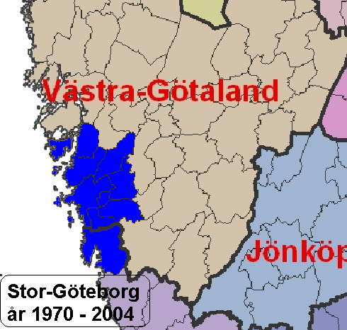 stor-gbg before 2005